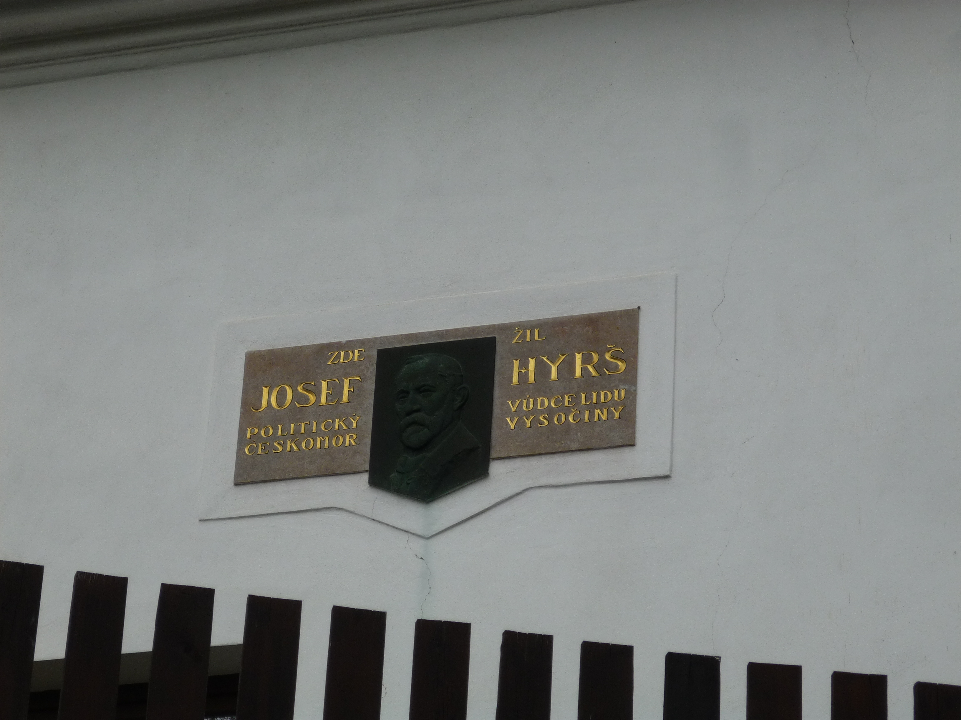 Autor fotografie Jiří Zelenka. Toulky Vysočinou. Cestou krajem básníka a malíře Jana Zrzavého. Obec Okrouhlice. Okr. Havlíčkův Brod.